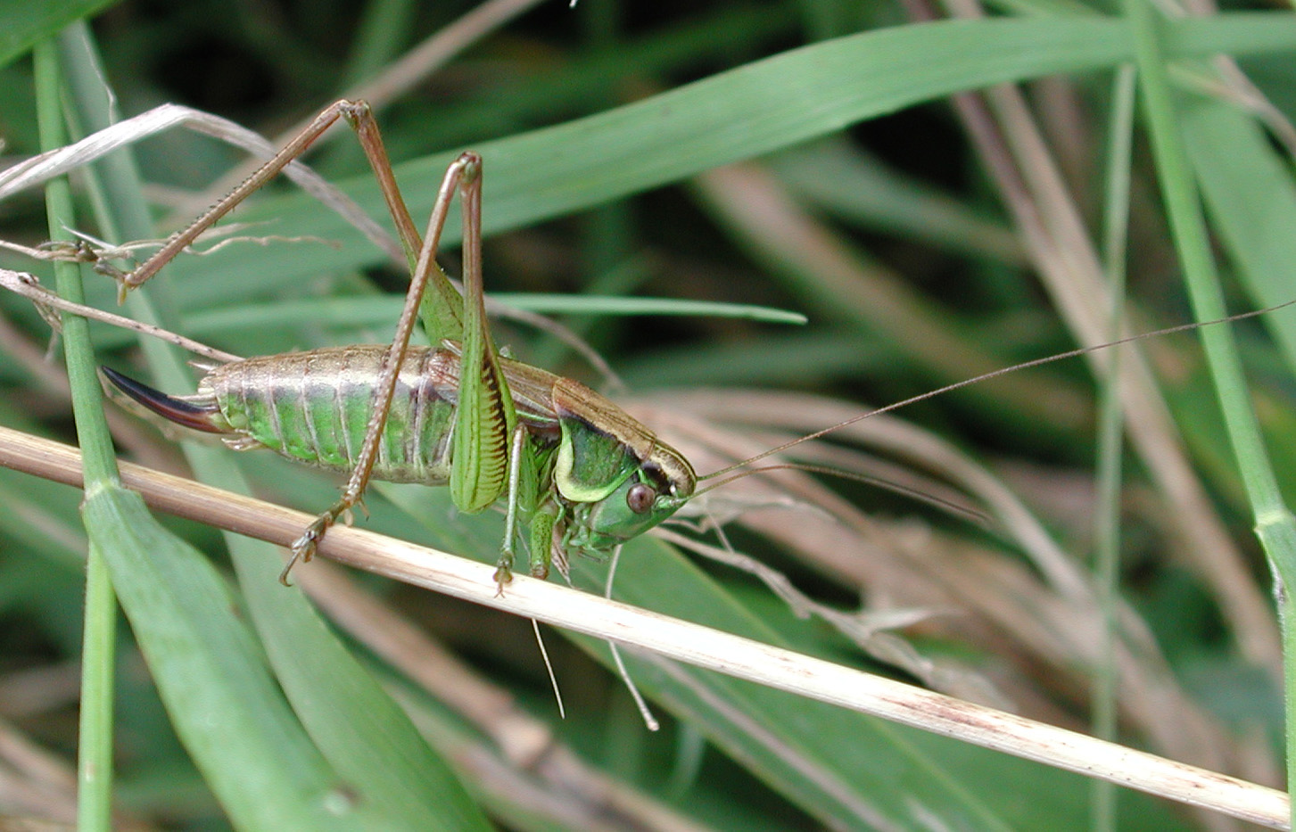 Metrioptera Roeselii, f., Roesel's Beißschrecke, NSG Kirchwerder Wiesen, Elbmarsch bei Hamburg, Deutschland